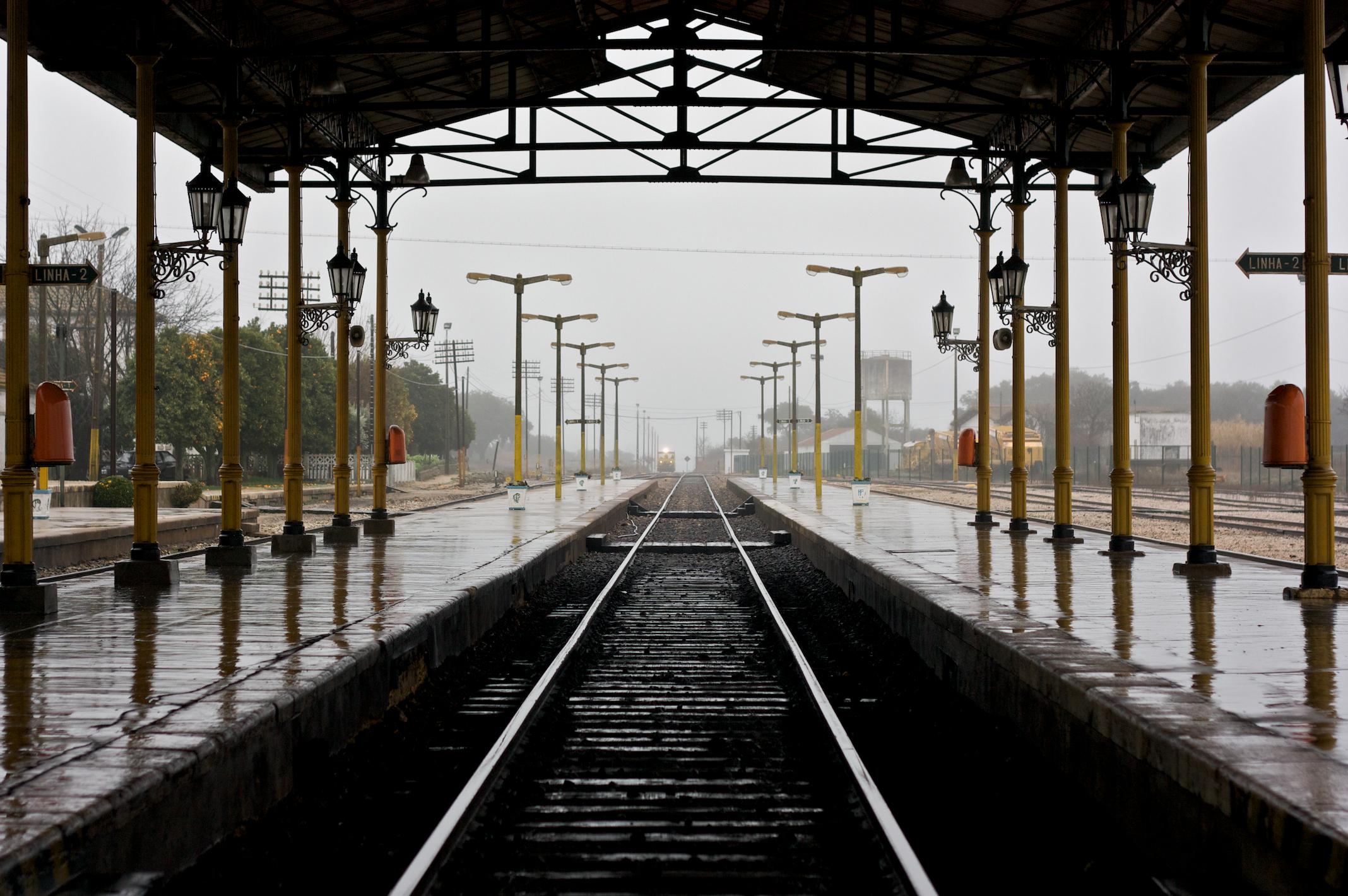 Tipo: ES Estação Satélite Local: Casa Branca [Linha do Alentejo, PK 90 • Linha de Évora, PK 90] Data e hora: 22 de Janeiro de 2009 [16h41]